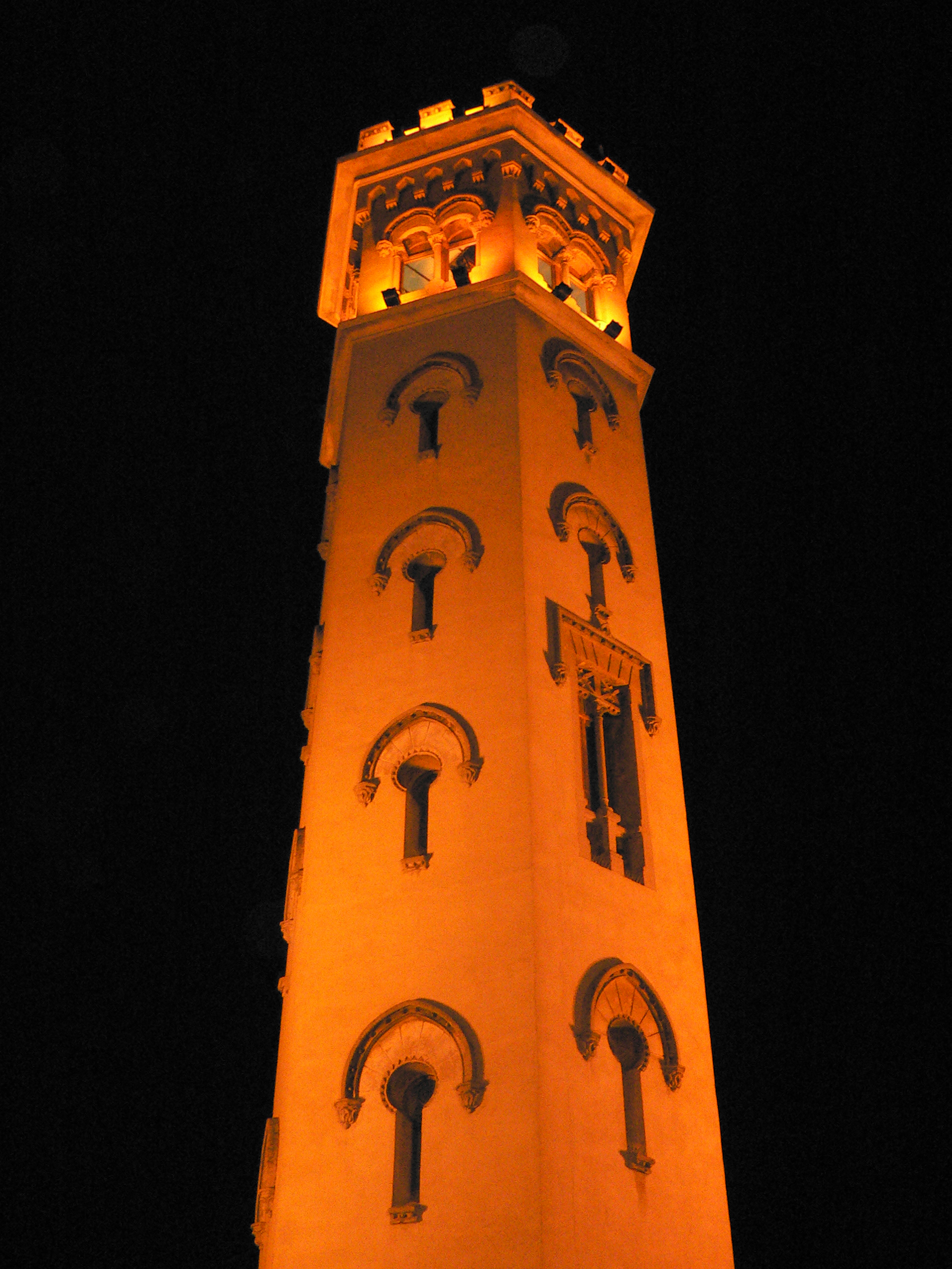 Torre della Miranda, located in Cornellà de Llobregat, province of Barcelona, Catalonia, Spain.